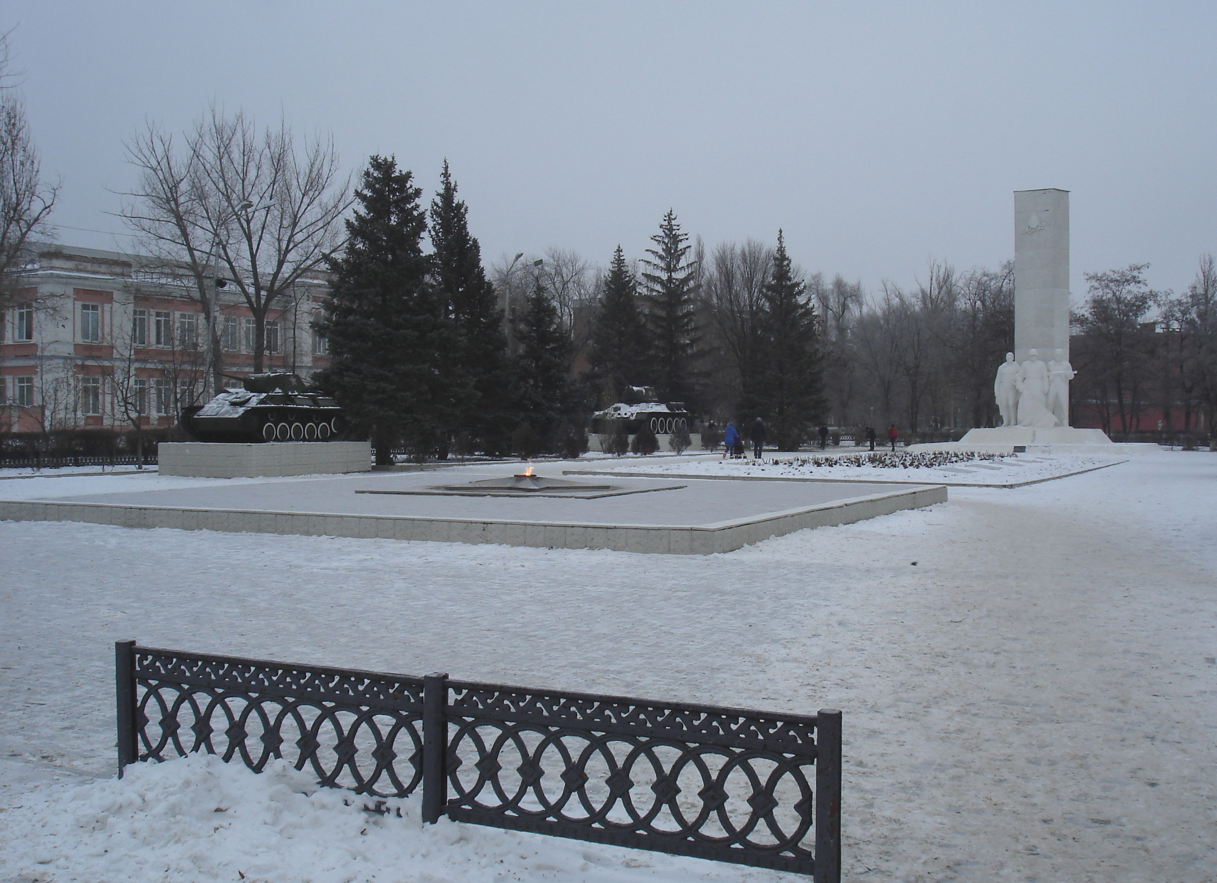 Мемориальный комплекс погибшим в Гражданской и Великой Отечественной войнах, Каменск-Шахтинский